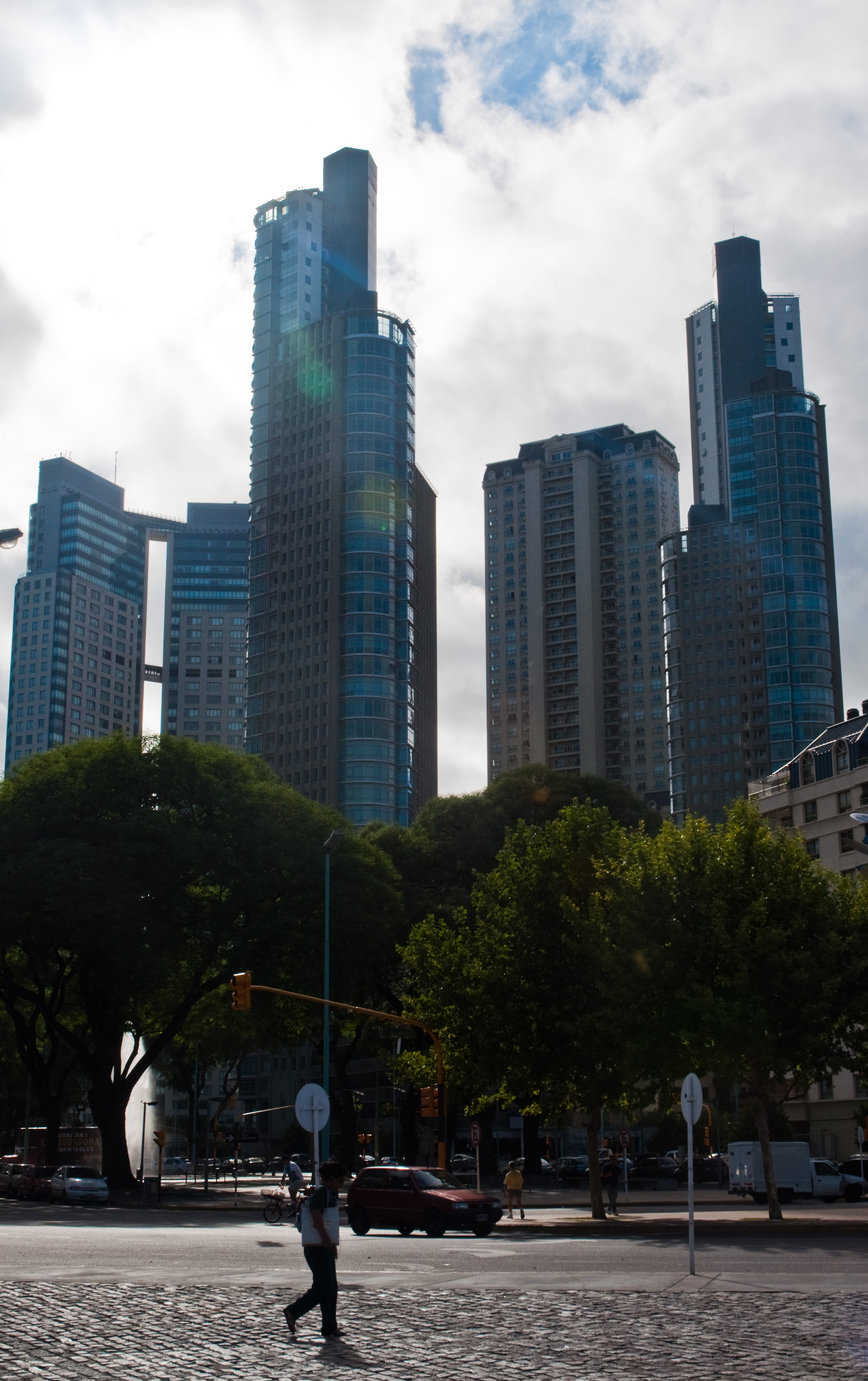 Puerto Madero, Buenos Aires, Argentina, 29th. Dec. 2010